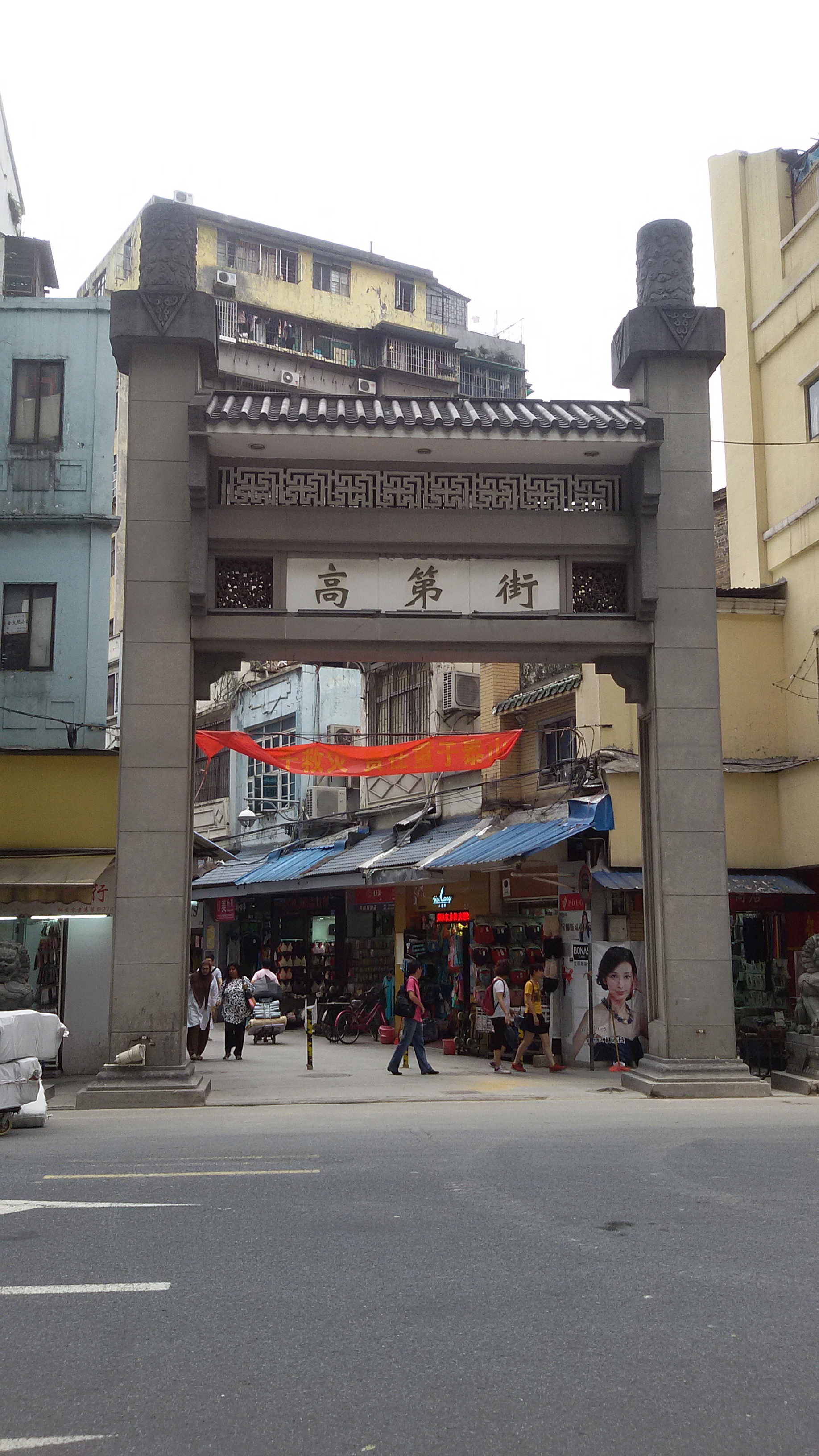 粵語: 高第街嘅牌坊